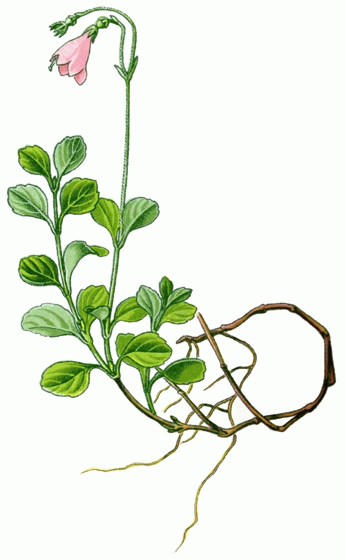 Fragment of Image:Illustration_Linnaea_borealis0.jpg, Linnaea borealis — Fig. from book Prof. Dr. Otto Wilhelm Thomé Flora von Deutschland, Österreich und der Schweiz 1885, Gera, Germany. Author: Otto Wilhelm Thomé